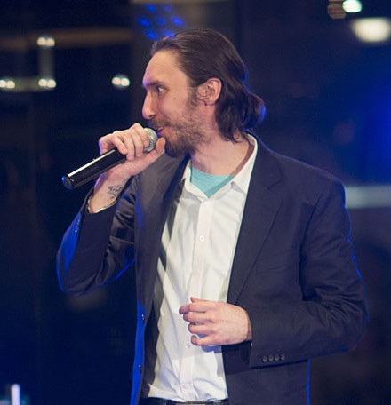 Marijus Berenis Tru